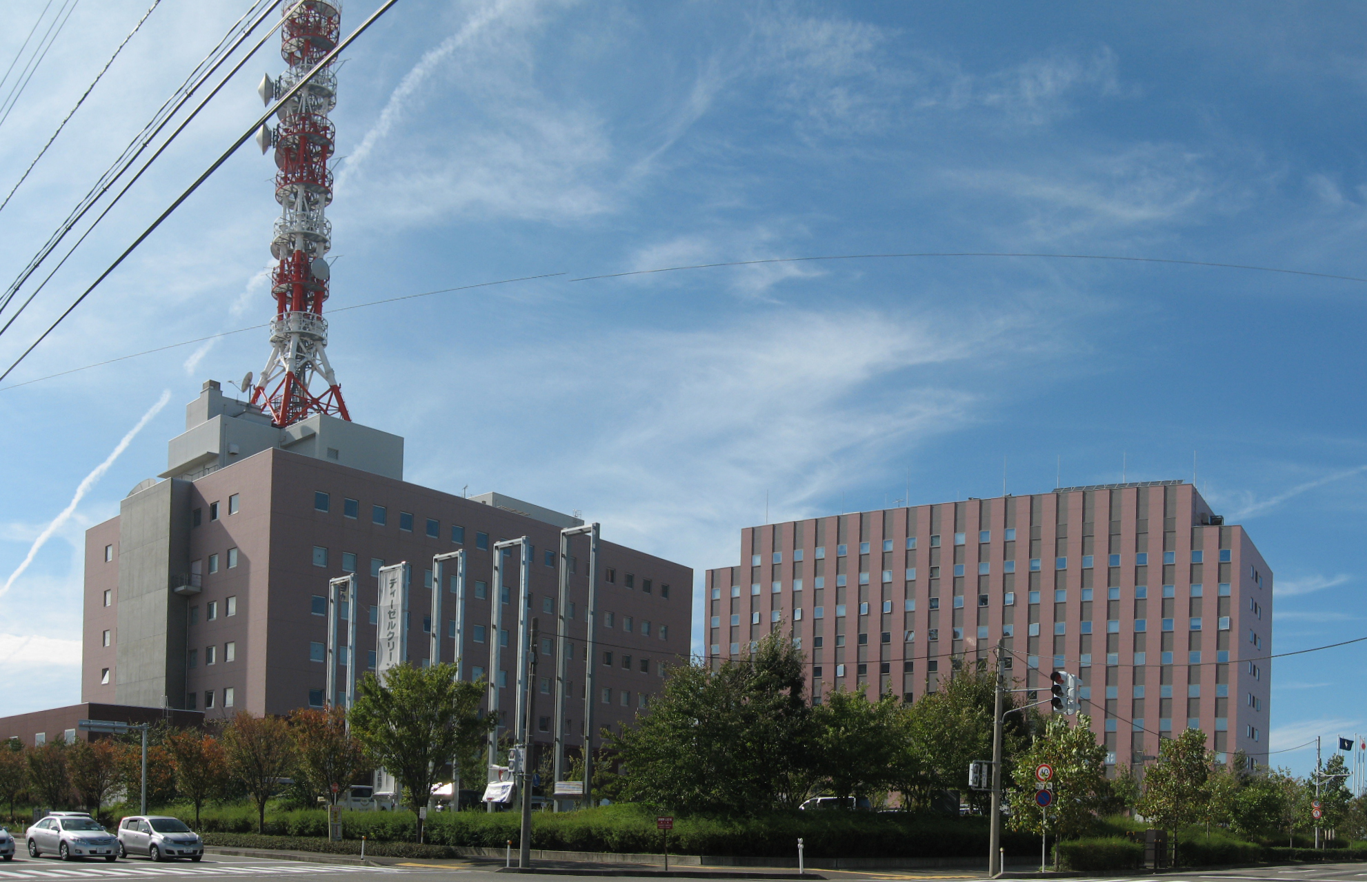 新潟美咲合同庁舎の画像。